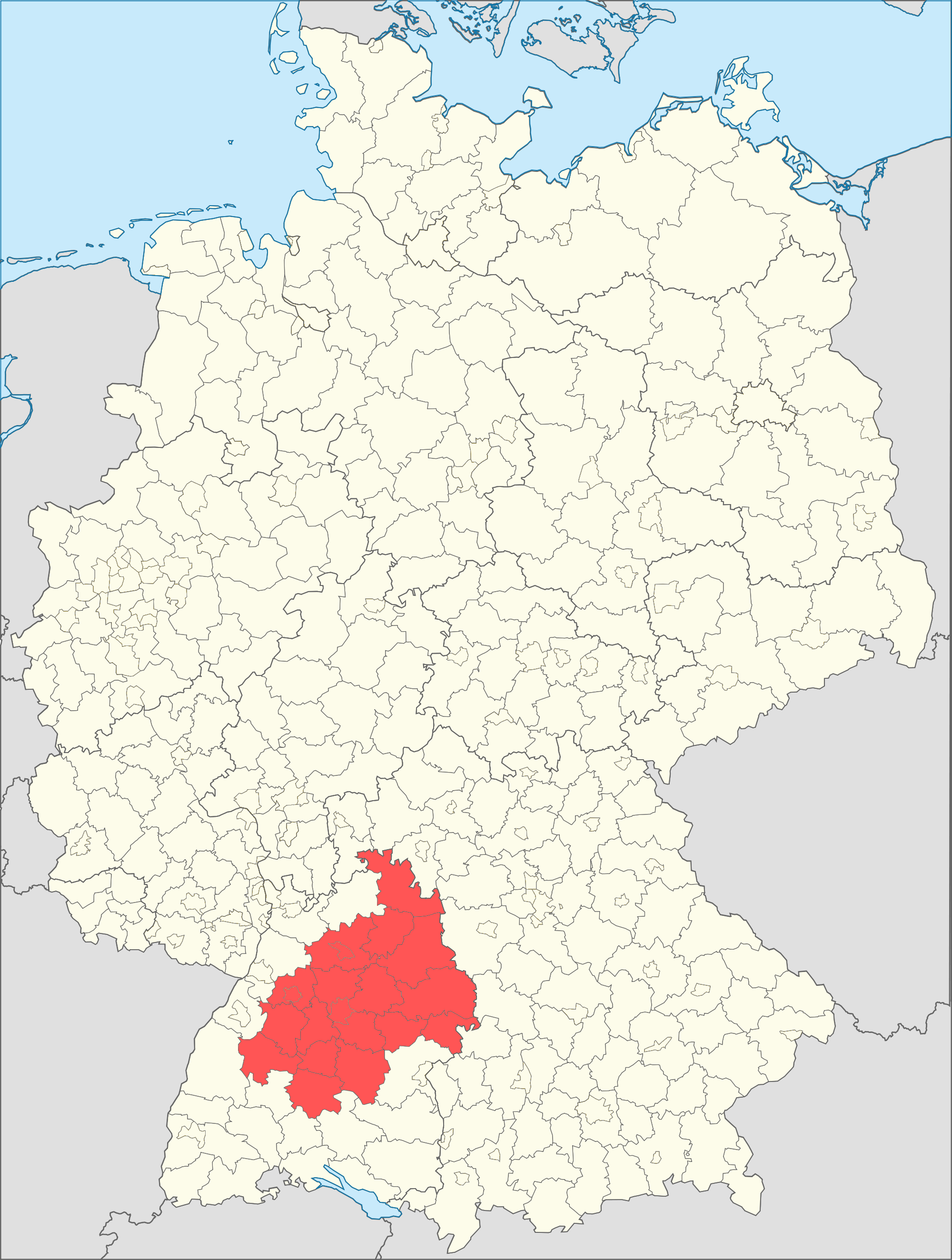 situo de la metropola regiono Stutgarto (ruĝe) ene de Germanio